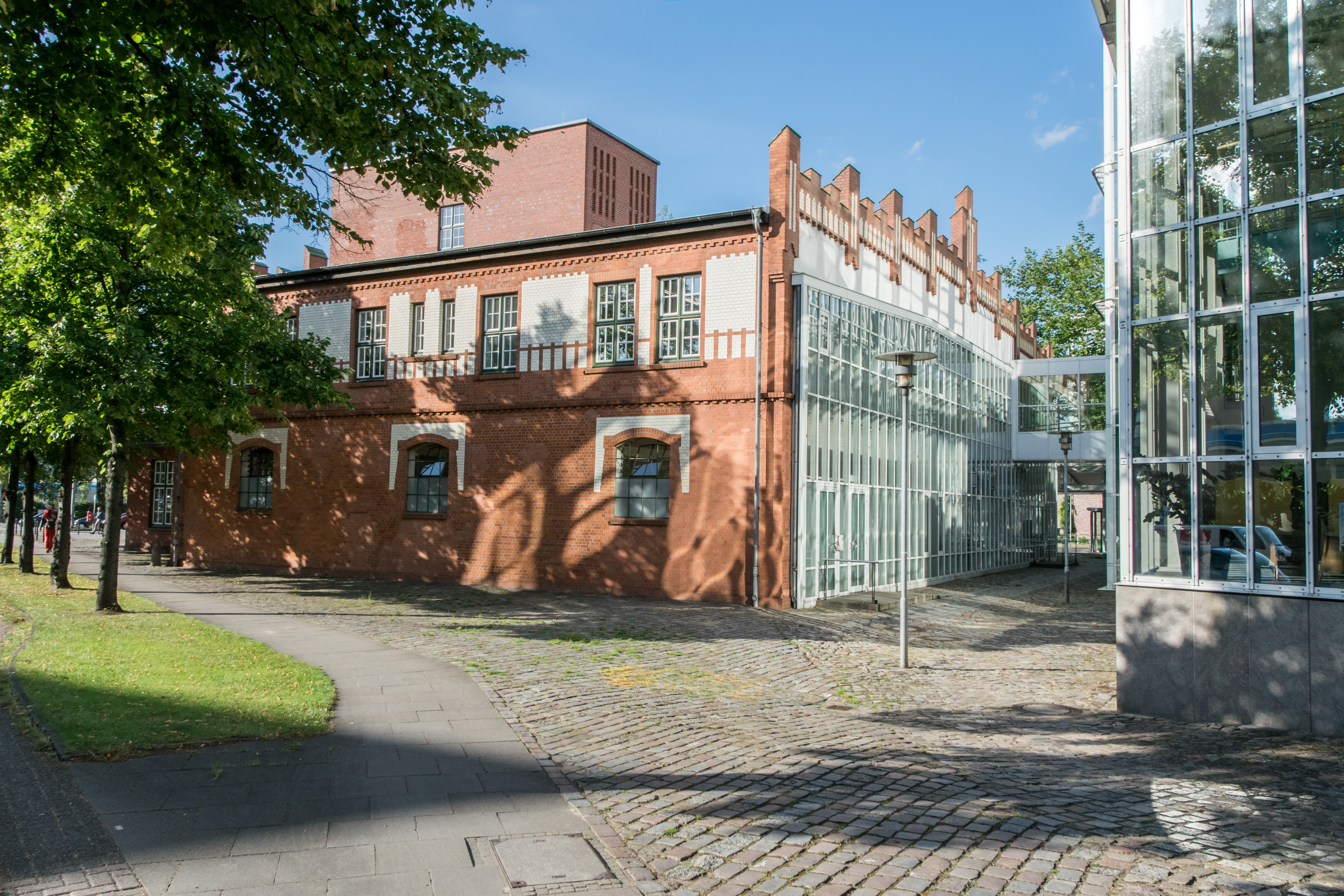 HH-Barmbek Eingangsbauwerk der ehemaligen Margarinefabrik Voss von Südosten